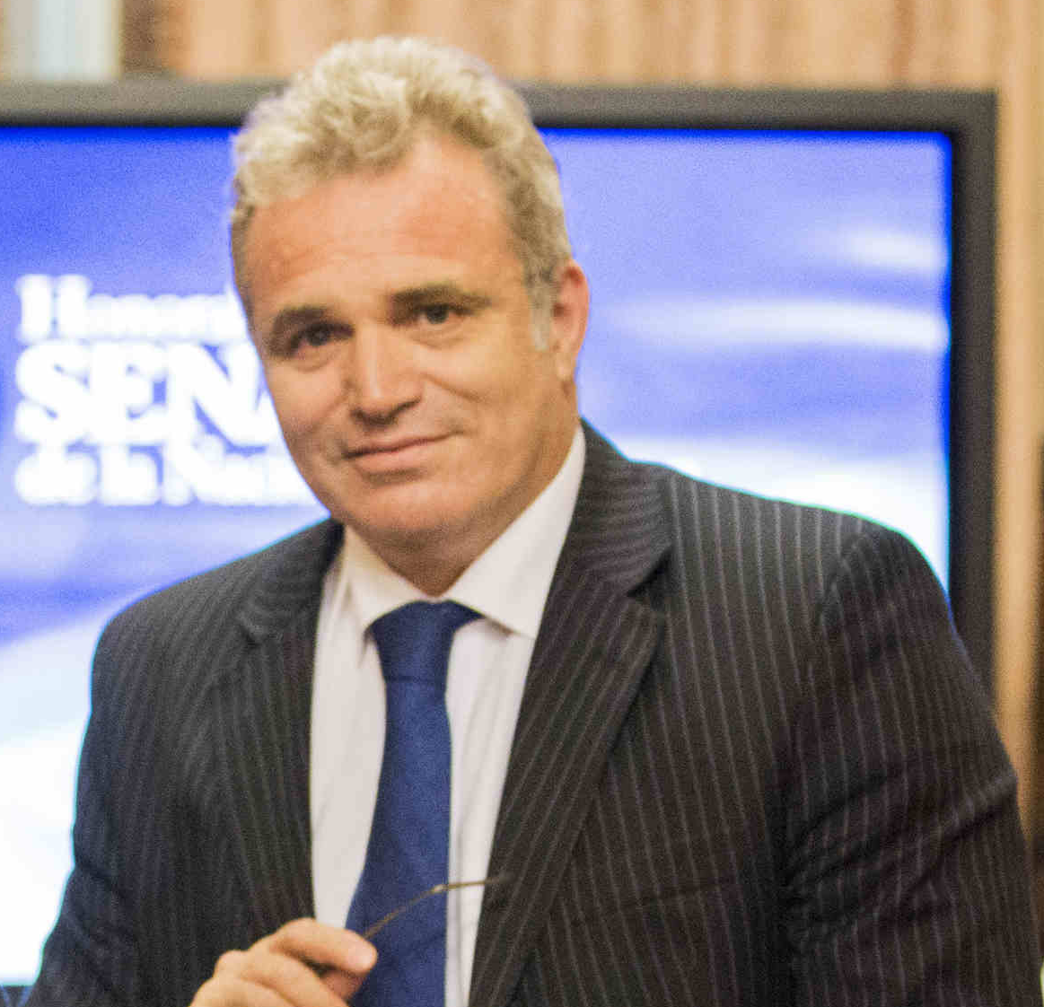 El Prosecretario Administrativo Mario Daniele hace entrega a la Sensei Nobuko Oshiro de un diploma de honor en reconocimiento a su trayectoria.